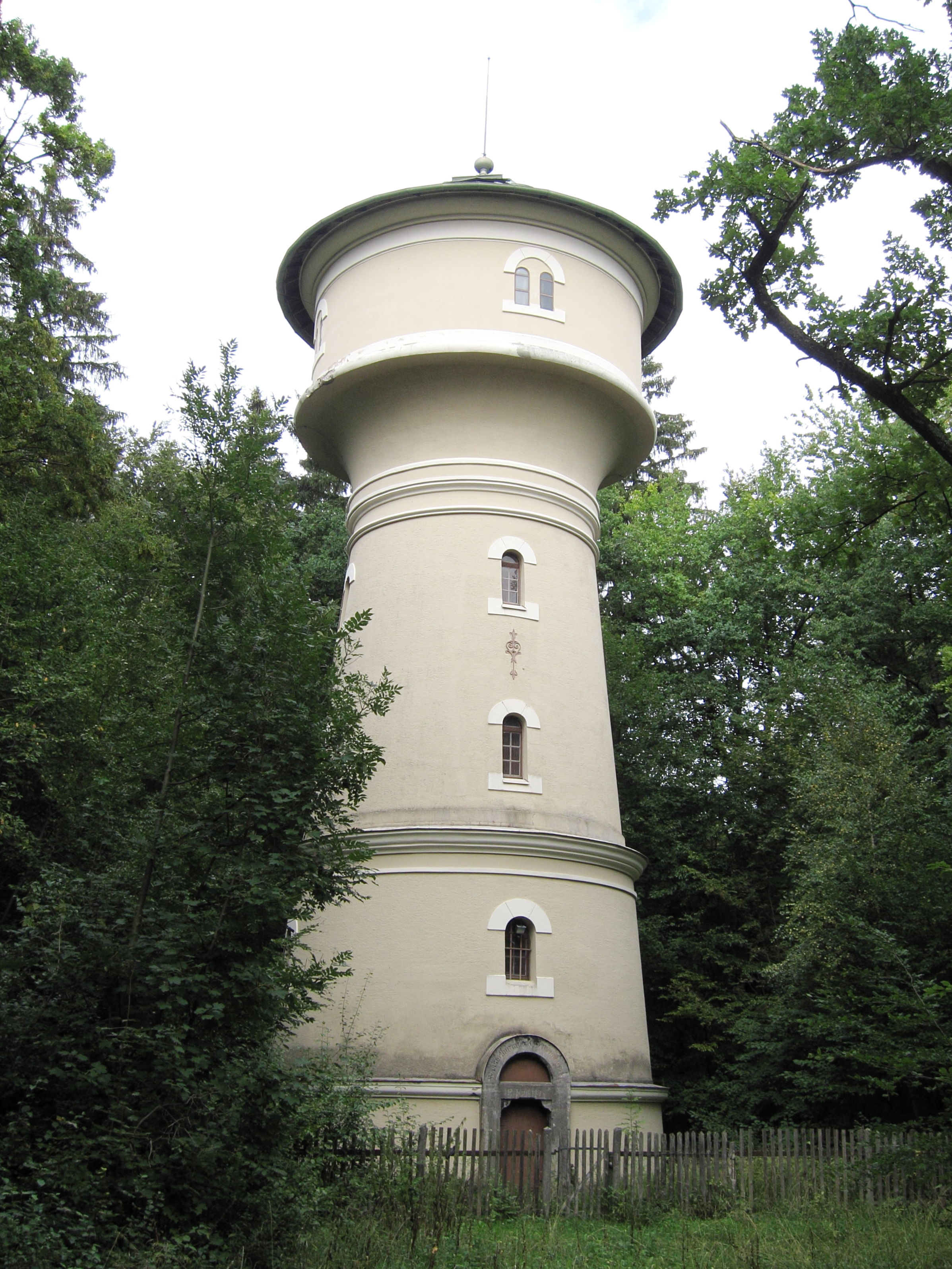 Wasserturm, mit Bezeichnung Kgl. Hofbrunnwerke München 1895